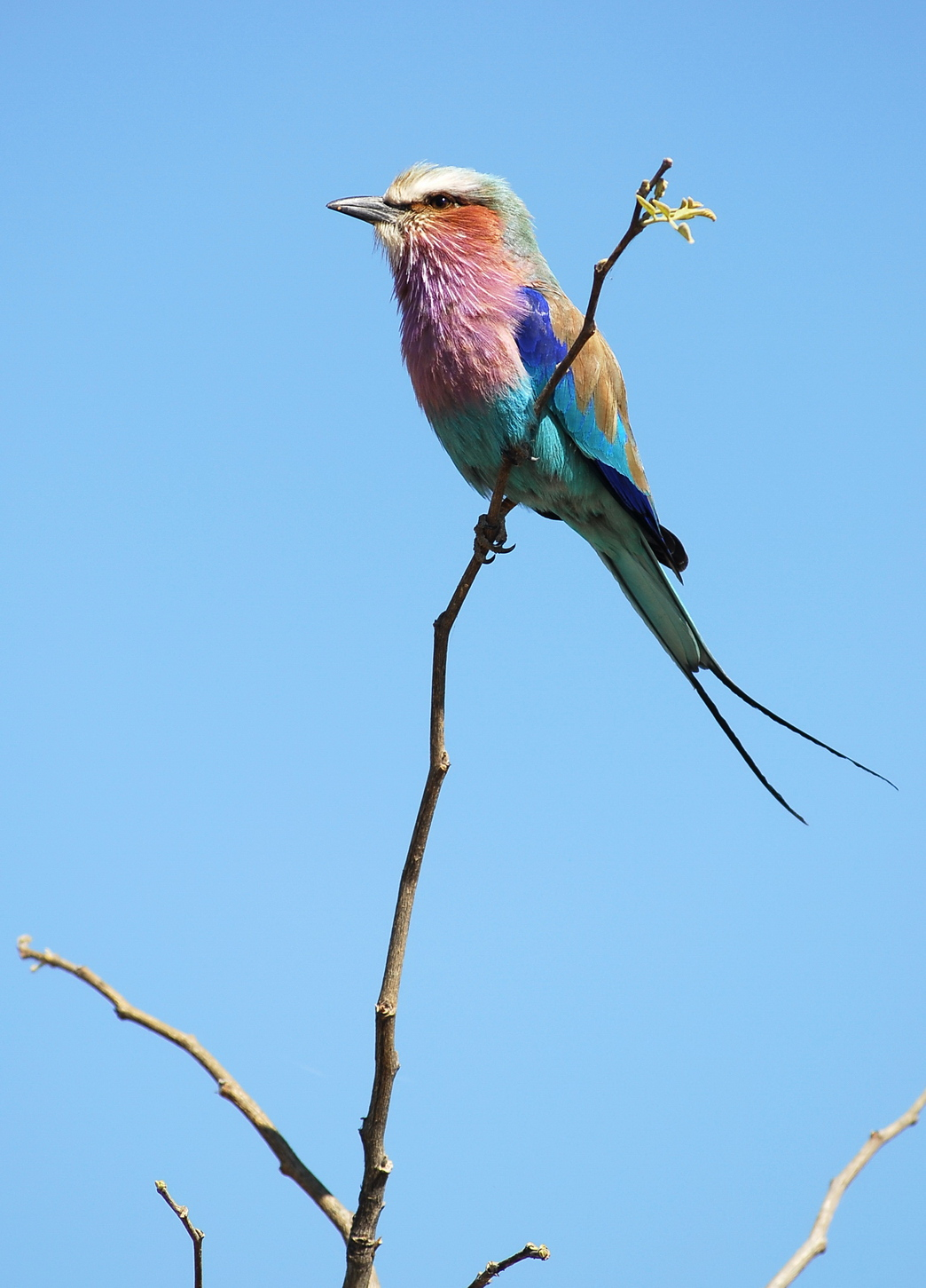 Botswana, Moremi, Okavango